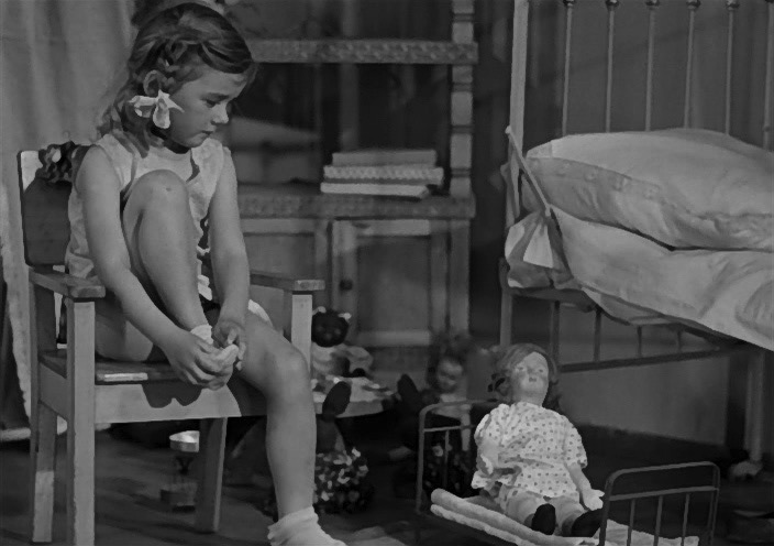 «Подкидыш» — художественный фильм производства киностудии «Мосфильм» 1939 года. Один из самых первых семейных фильмов в Советском Союзе, сценаристами которого стали актриса Рина Зелёная и писательница Агния Барто. Героиня фильма Наташа.